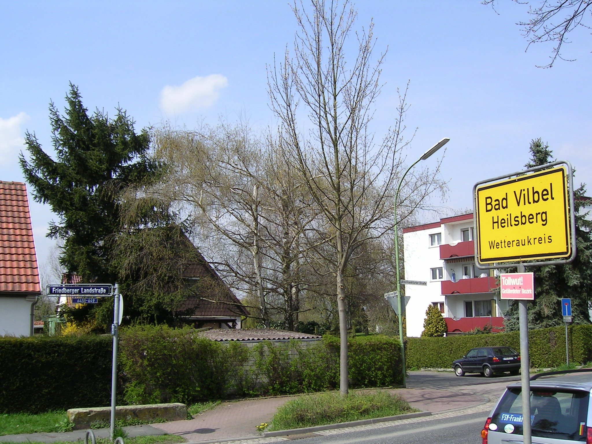 Ende der Friedberger Landstrasse, an der Stadtgrenze zwischen Frankfurt am Main und Bad Vilbel in der Siedlung Heilsberg